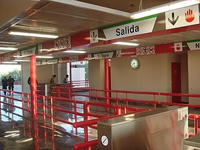 Boletos de la estacion.